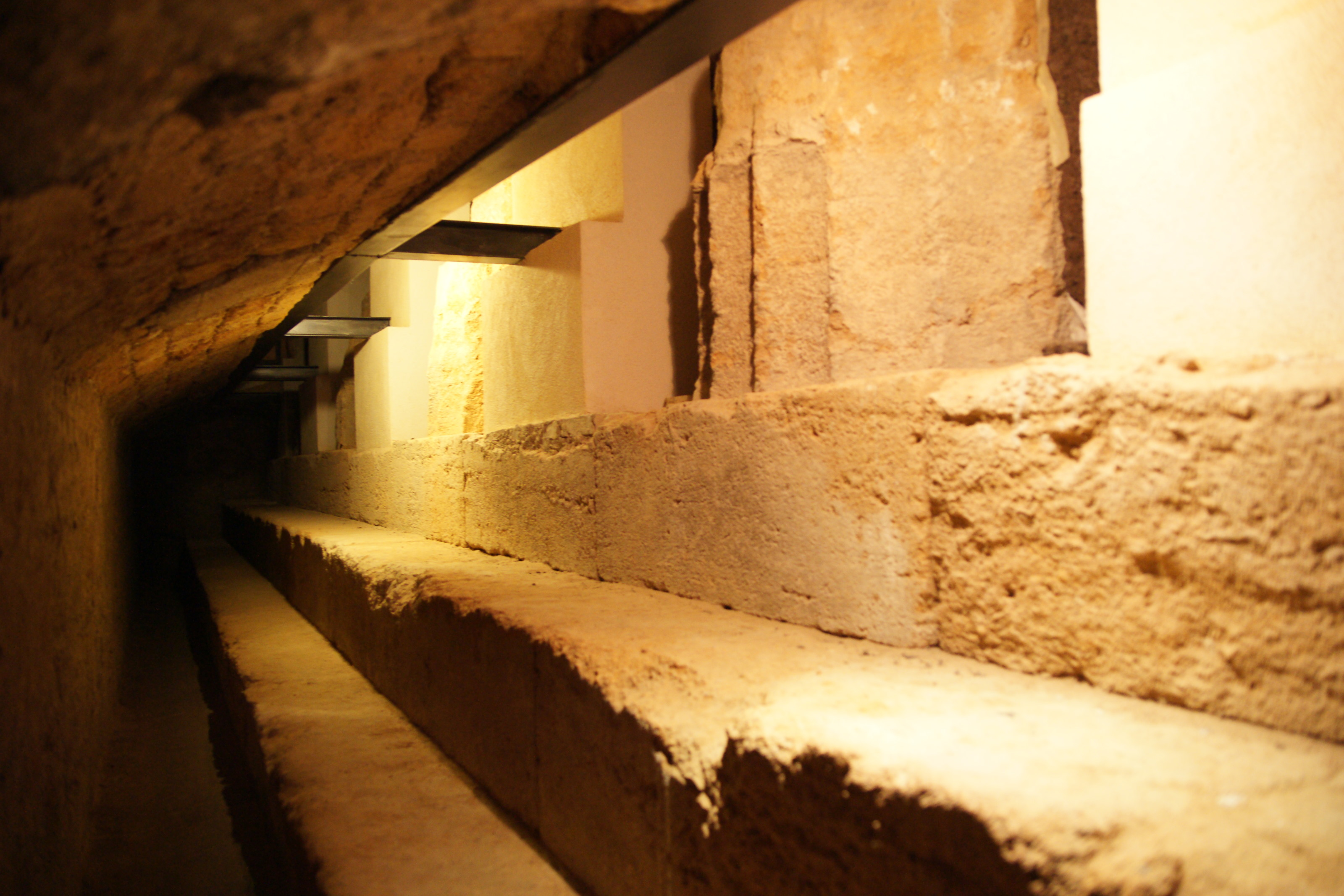 Agrigento: Santa Maria dei Greci (Tempelfundament)